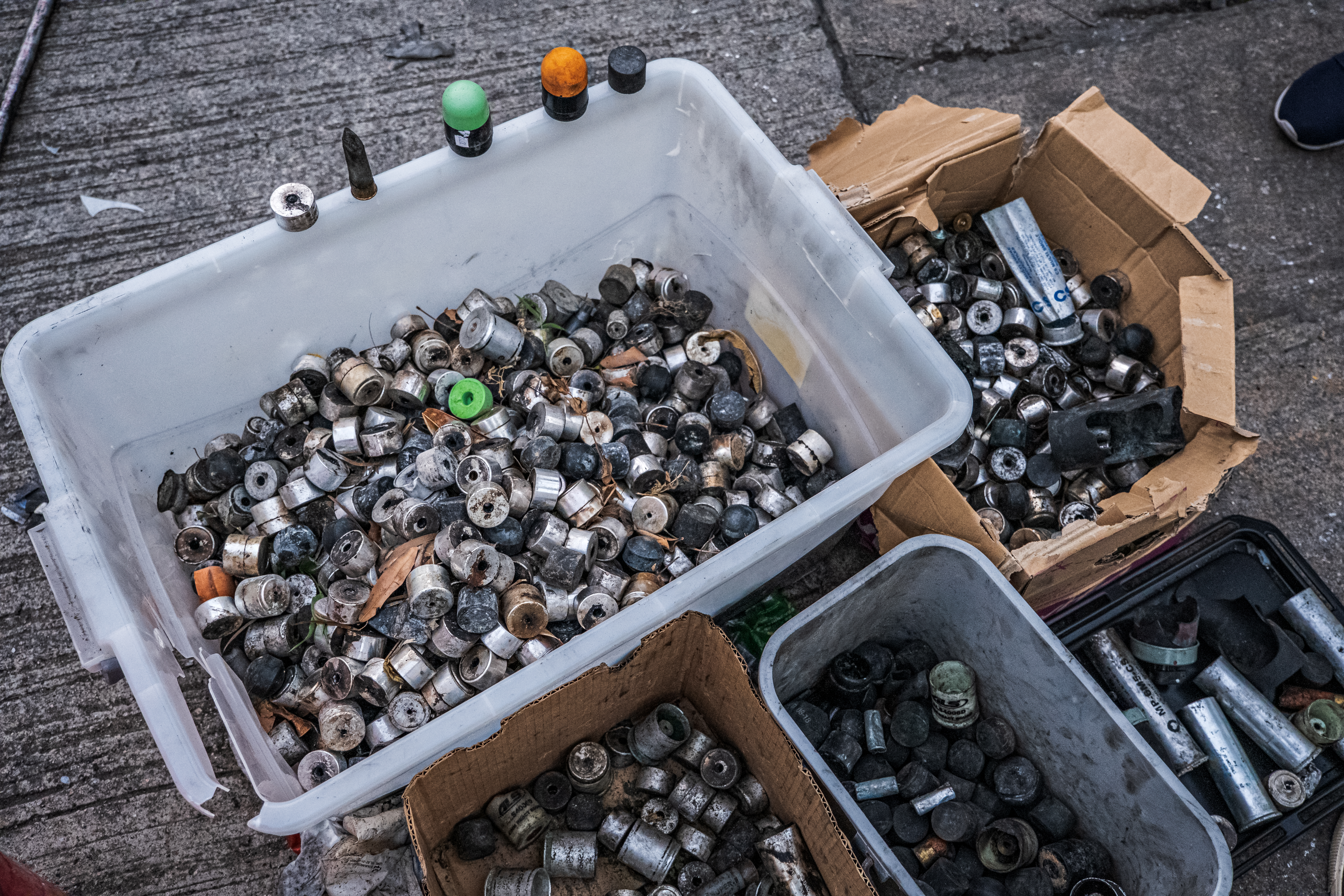 粵語: 中国香港差人圍攻香港中文大學留低嘅催淚彈殼、海綿彈等等